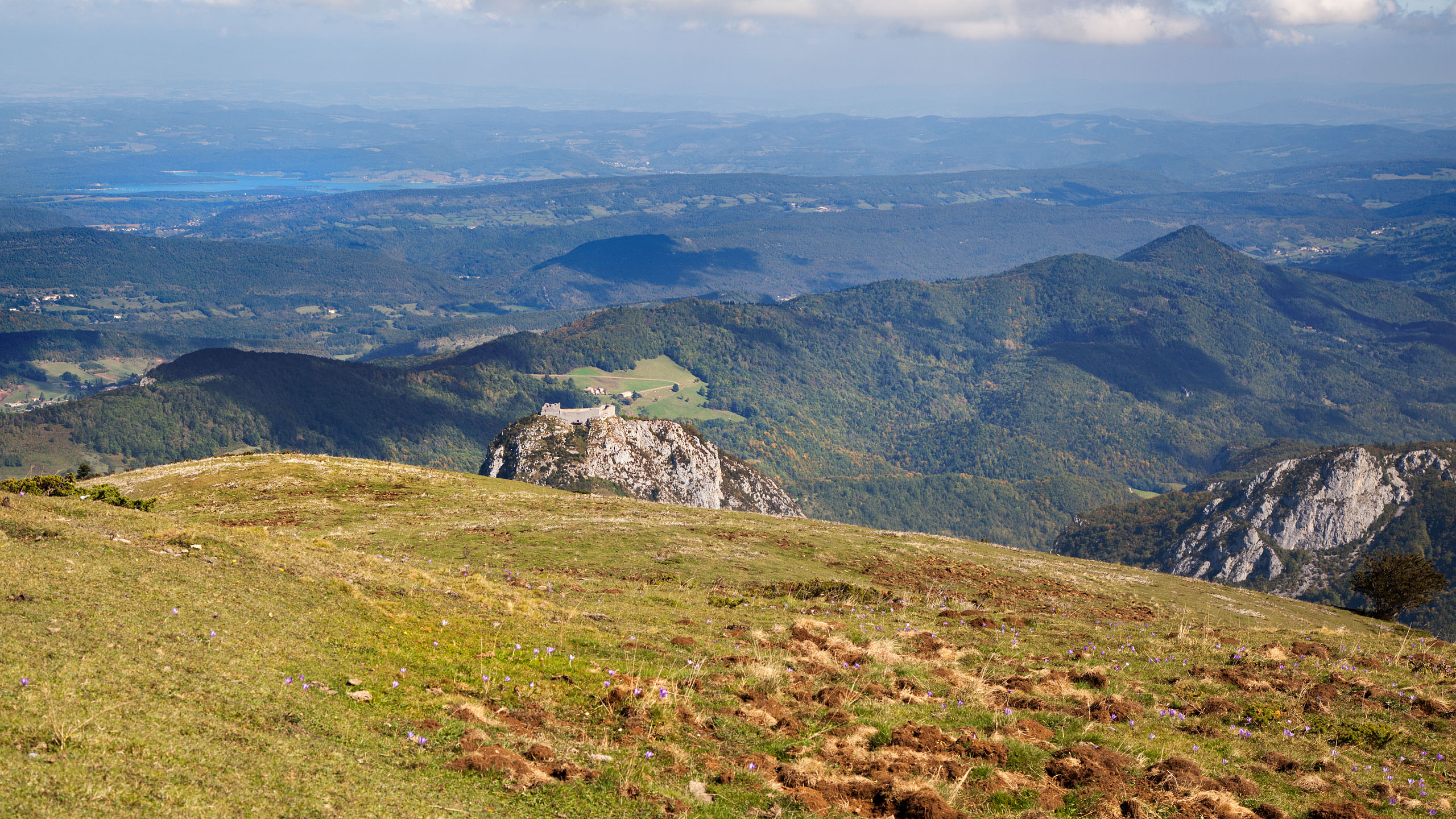 Panorama